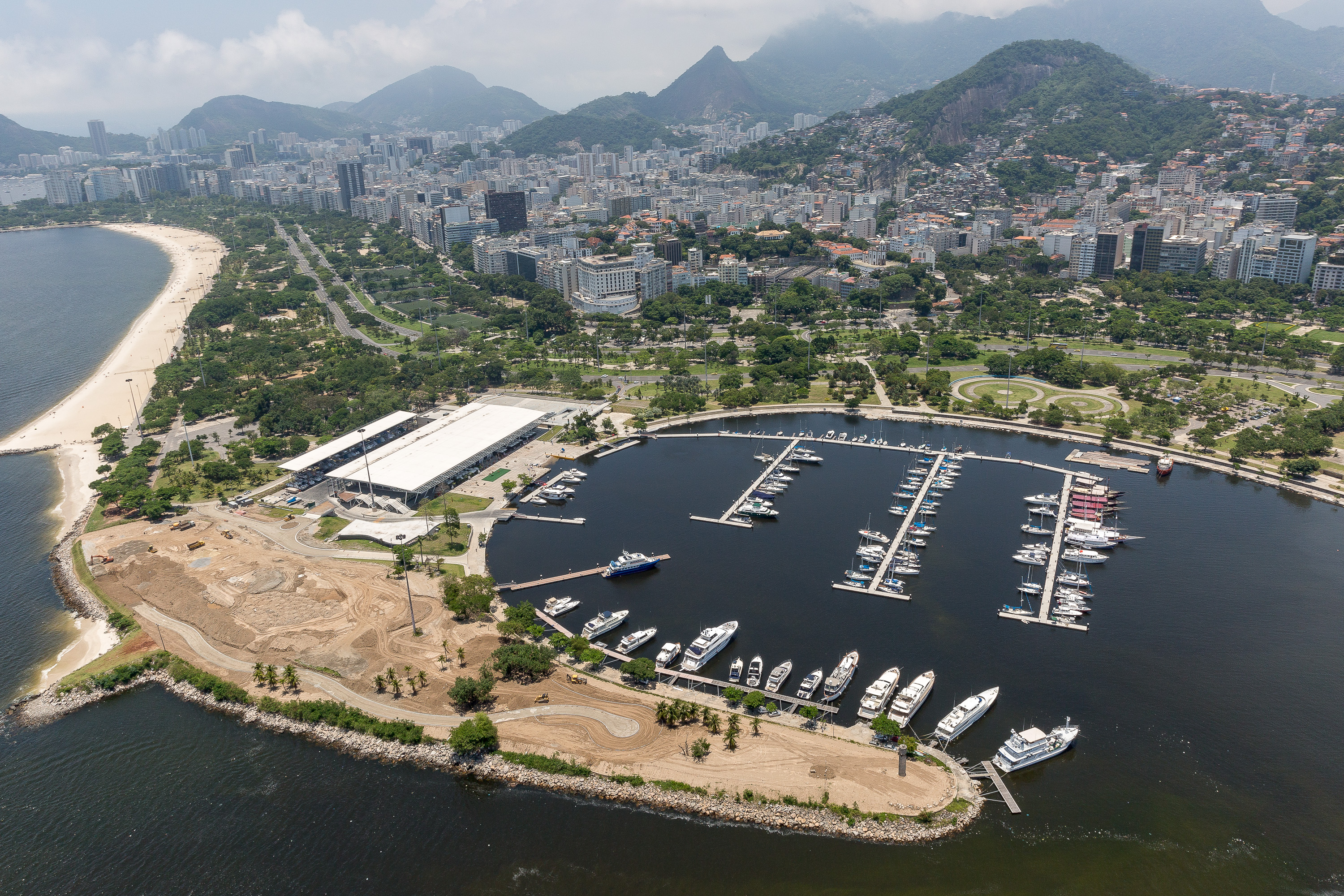 Vista aérea da Marina da Glória localizada na cidade do Rio de Janeiro